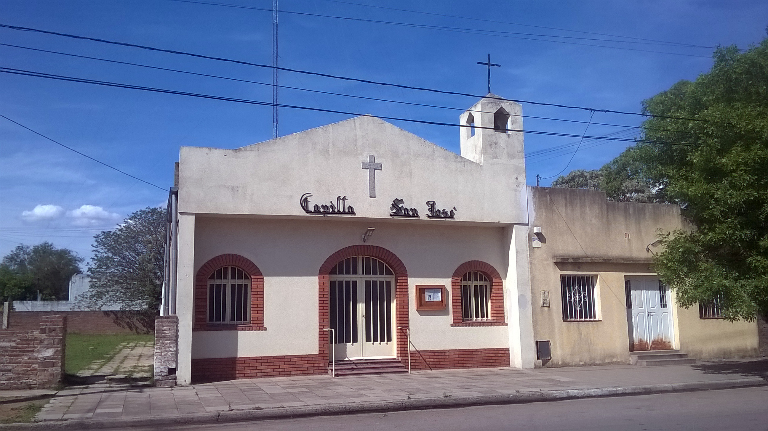 Iglesia Catolica San José en General Pico Calle 34 entre 5 y 7.